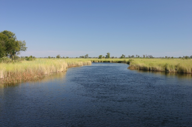 Okavango delta. Permanently flooded channel near Xakanaxa